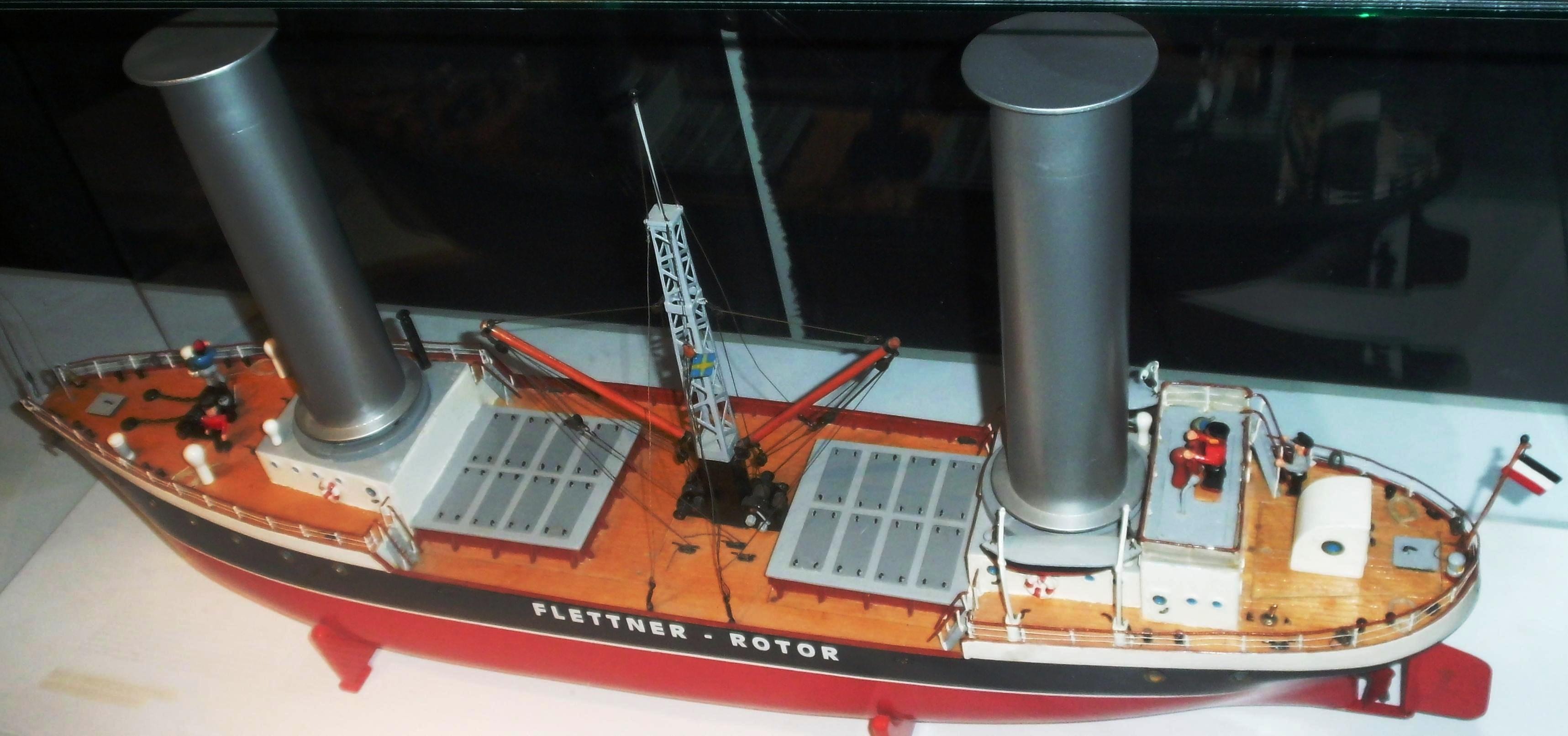 Modell der Buckau im Berliner Technikmuseum